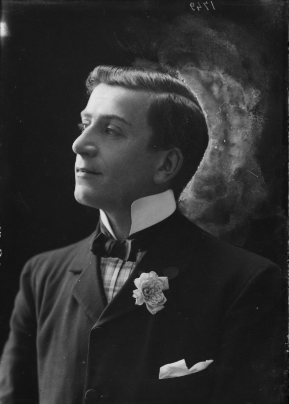 Armando Falconi fotografato da Mario Nunes Vais